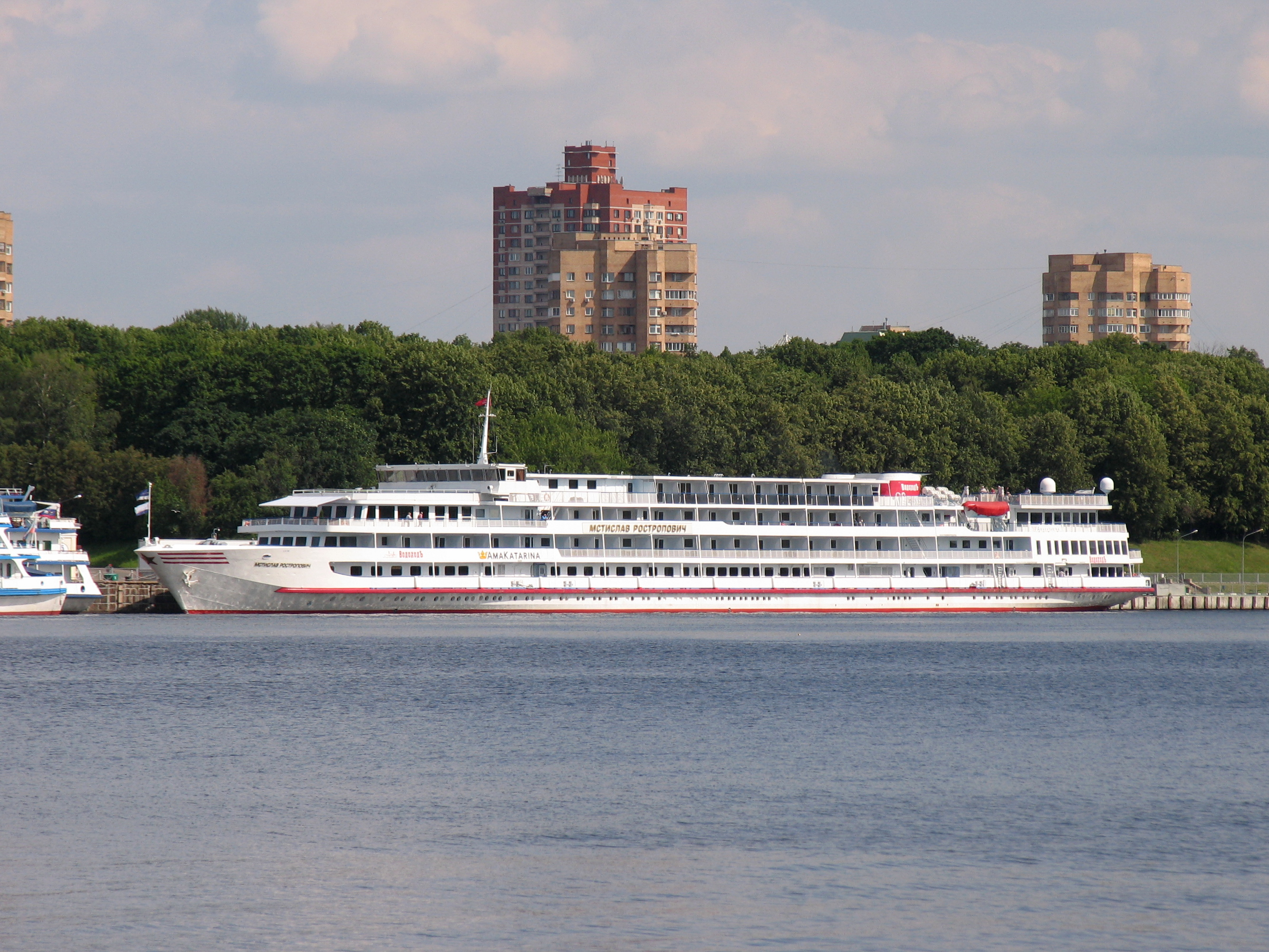 Речное круизное судно "Мстислав Ростропович" в Северном речном порту.